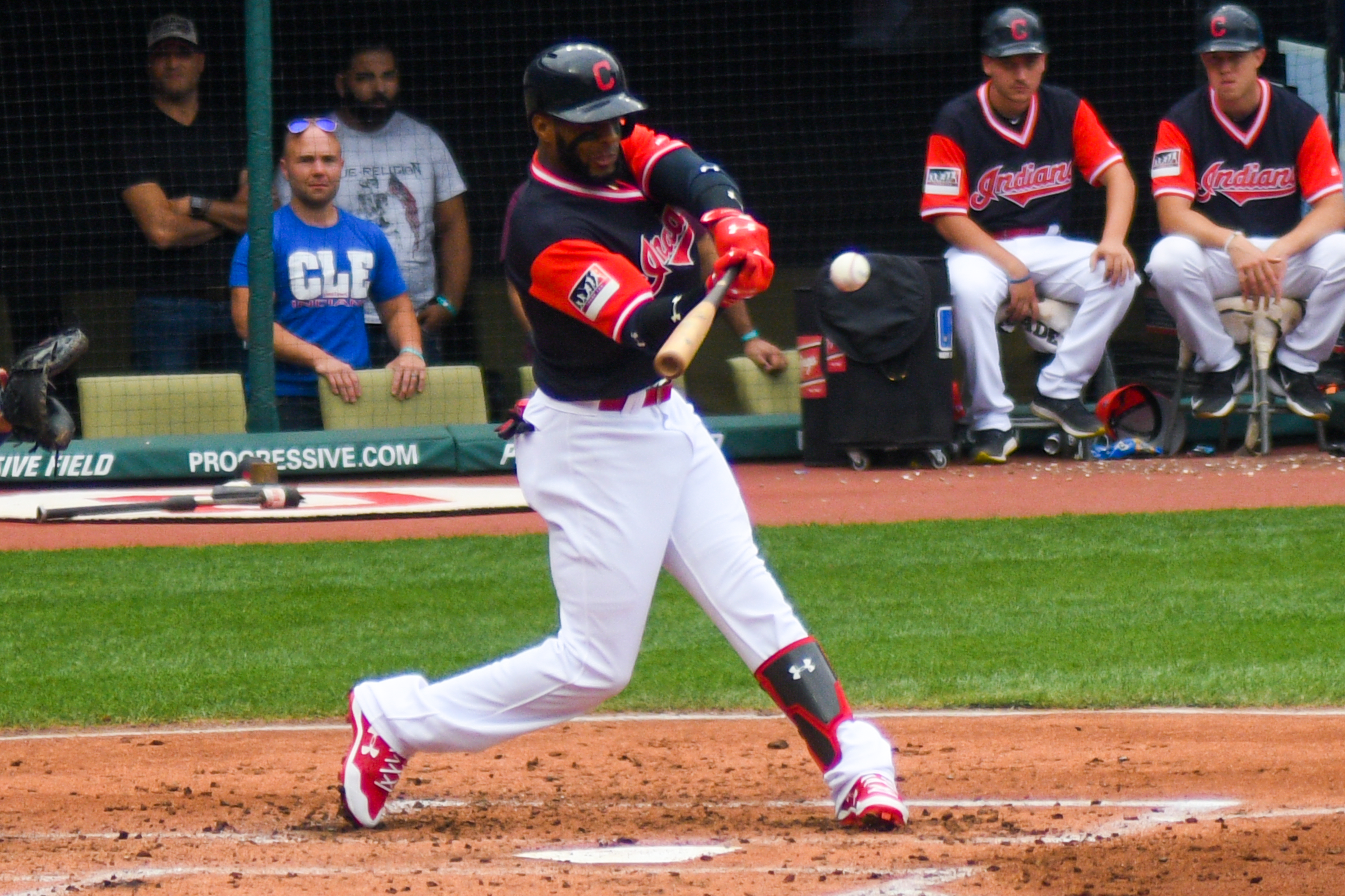 Yandy Diaz